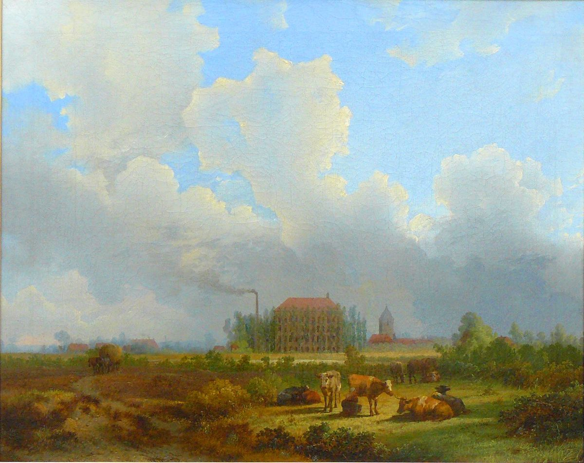 Tweede Stoomkatoenspinnerij Den Grooten Stoom – Gezicht op Enschede (vermoedelijk 1839). Collectie Edwina van Heek Stichting.